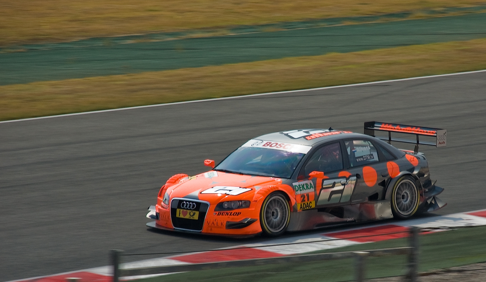 Albers